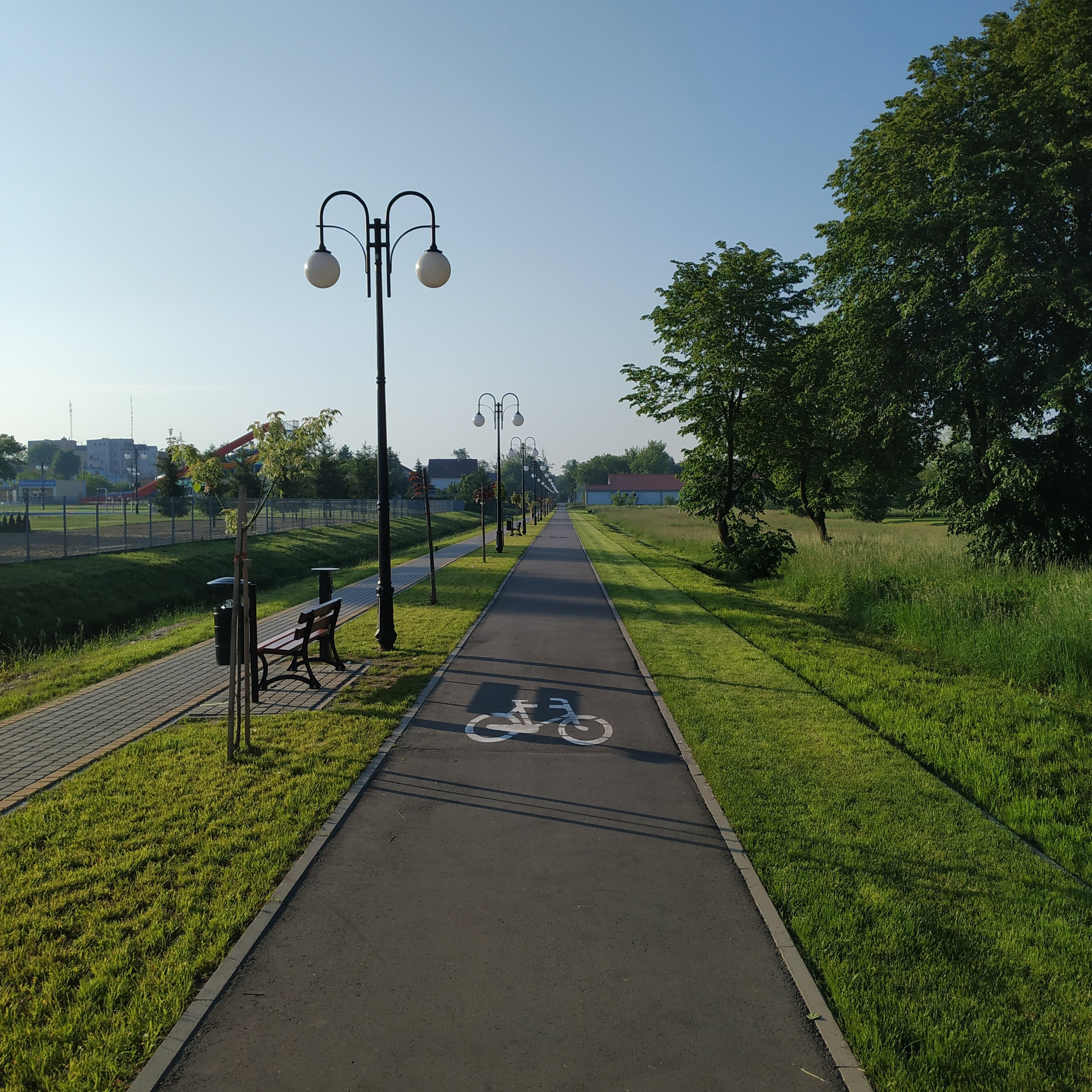 Bulwar nad Krzną w Łukowie